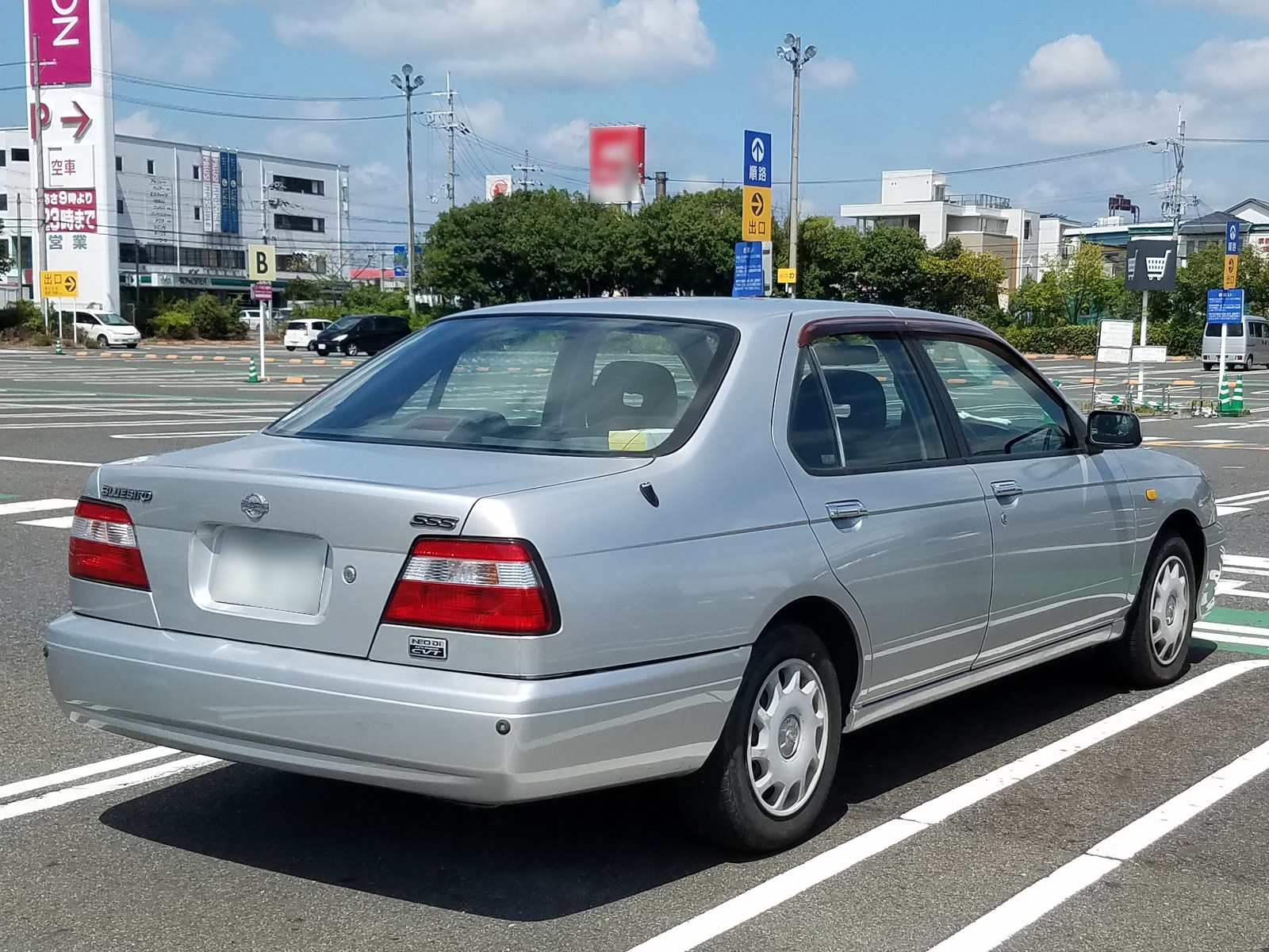 ブルーバード 1.8SSS NEO Di（後期型）